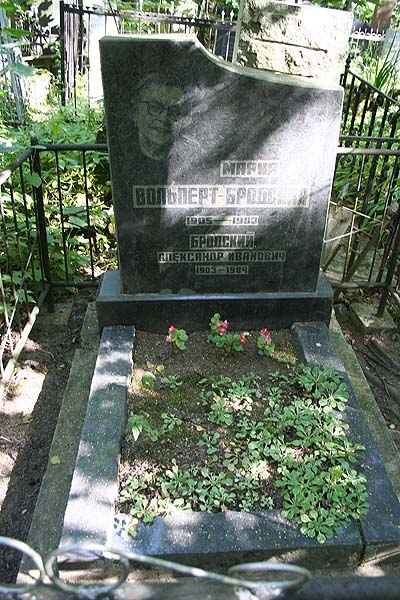 Александр Иванович Бродский (1903—1984), был военным фотокорреспондентом, после войны поступил на работу в фотолабораторию Военно-морского музея. В 1950 году демобилизован, после этого работал фотографом и журналистом в нескольких ленинградских газетах. Мария Моисеевна Вольперт (1905—1983)